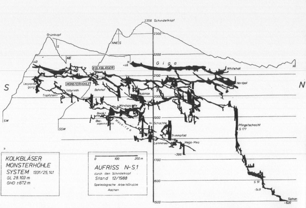 erschienen als Beilage von "Salzburger Höhlenbuch, Bd. 6, 1996